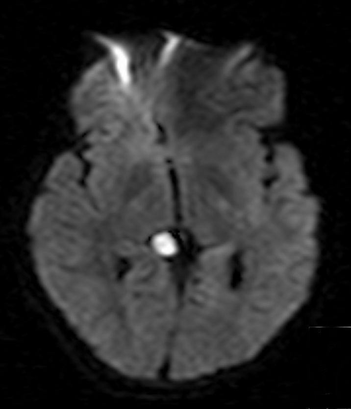 Intrakranielle Epidermoidzyste der Pinealisregion rechts paramedian. Magentresonanztomographie DWI axial: Der Befund zeigt sich deutlich hyperintens.